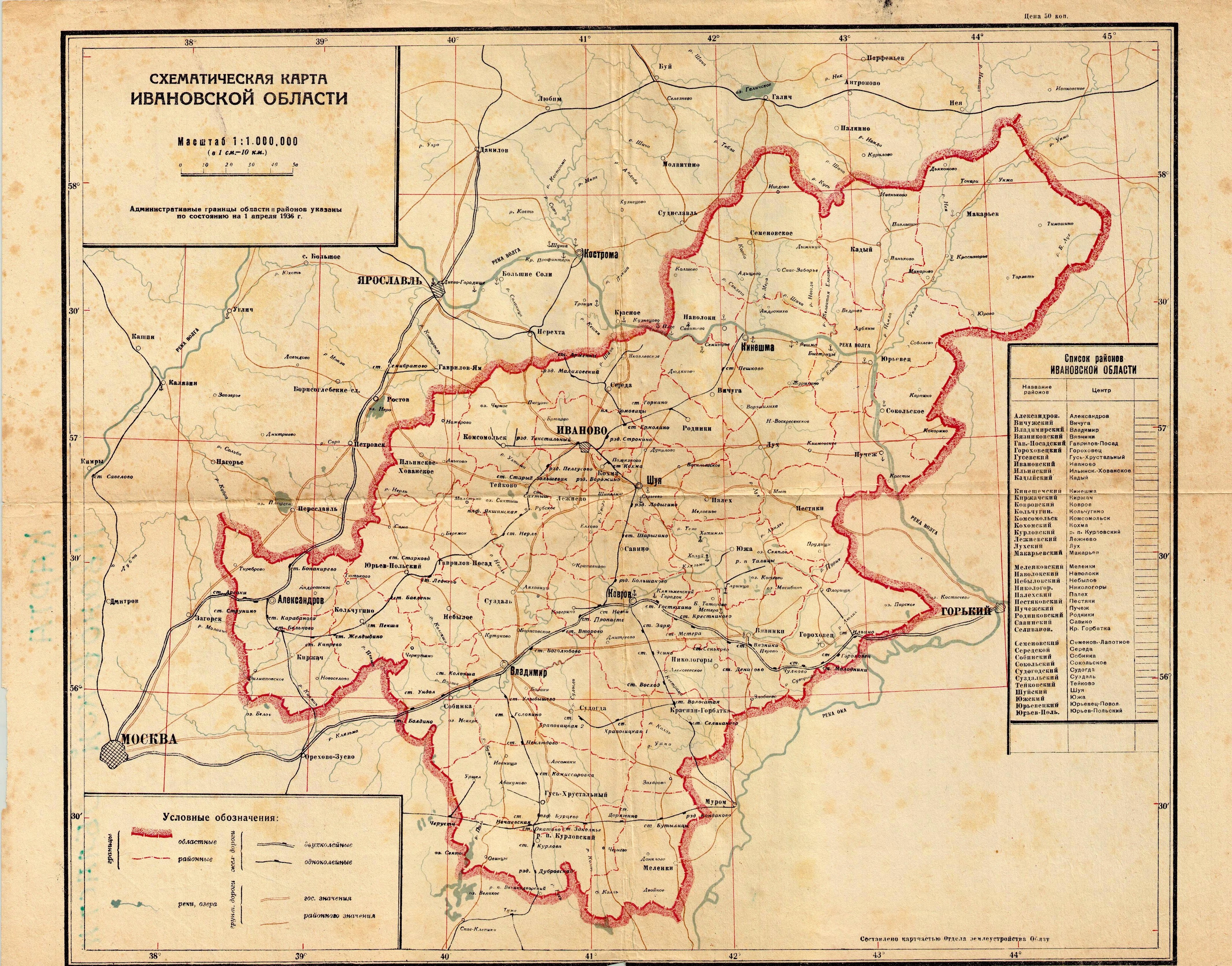 Схематическая карта Ивановской области. Масштаб 1:1.000.000 (в 1 см. - 10 км.) Административные границы области и районов указаны по состоянию на 1 апреля 1936 г.